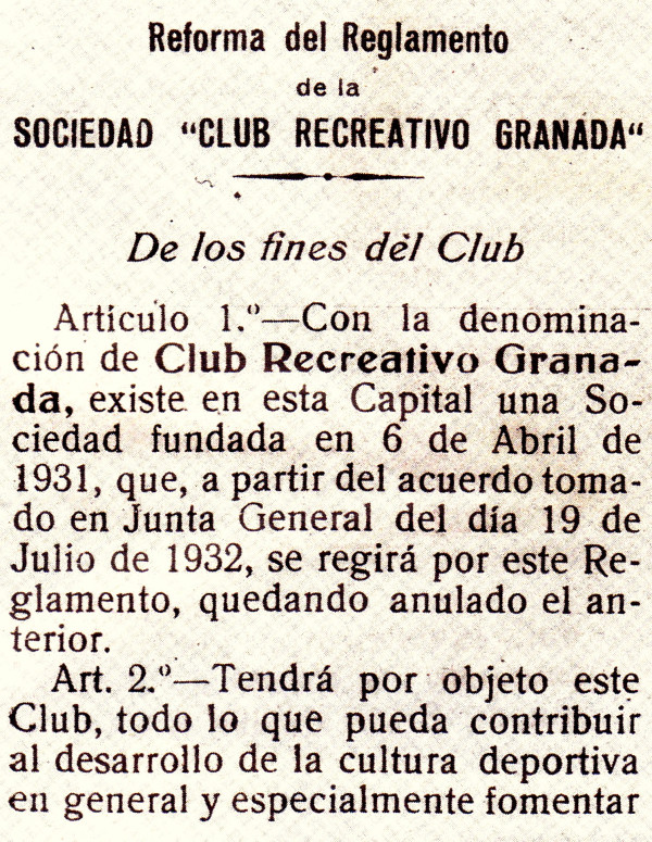 Artículo 1 de los Estatutos fundacionales del club